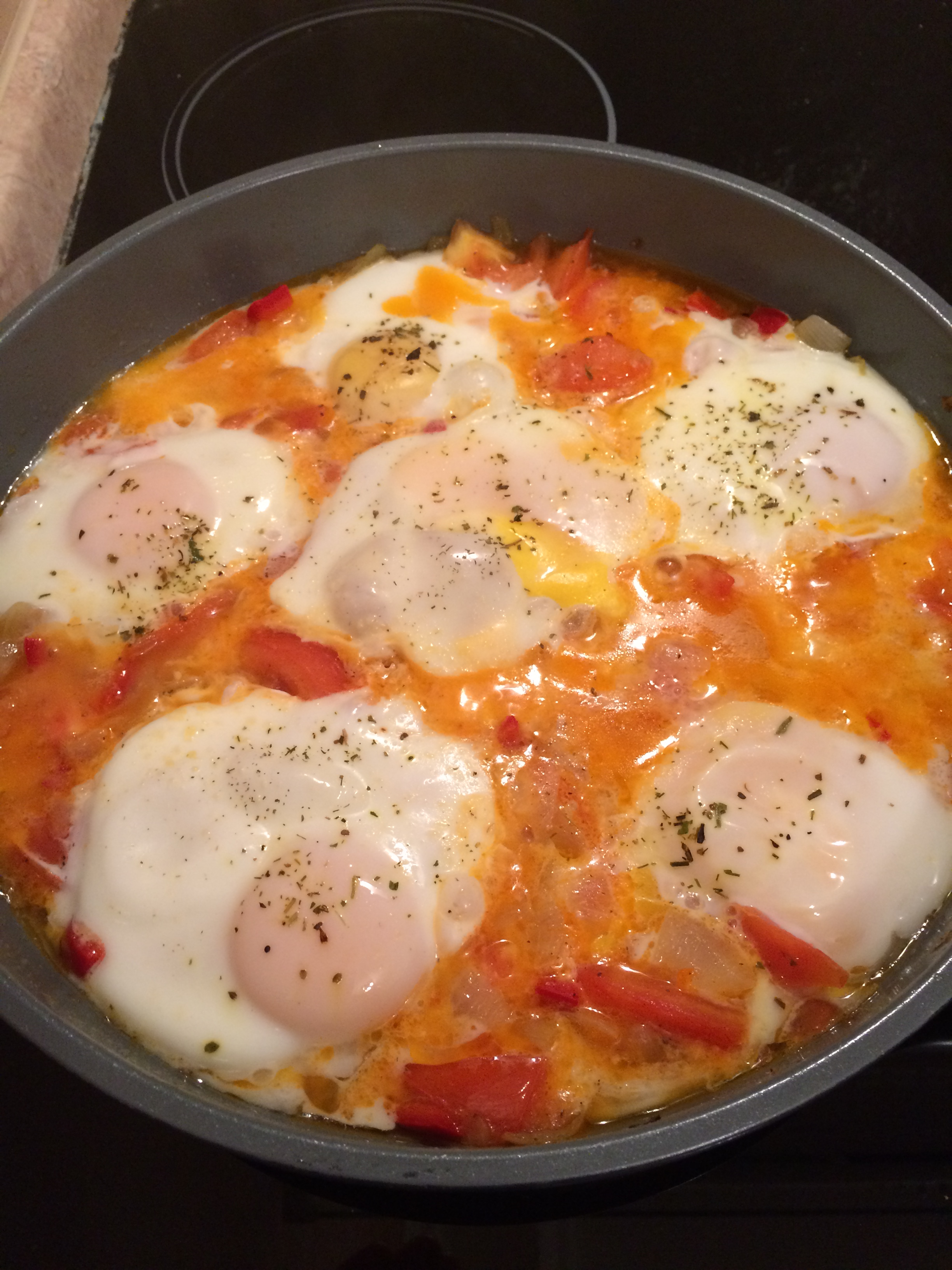 Шакшука з 6 яєць, приготовлена на пательні